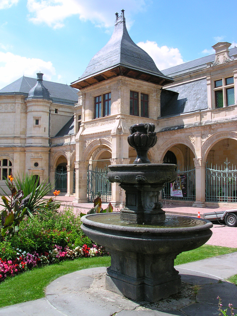 Le musée départemental Anne-de-Beaujeu de Moulins.